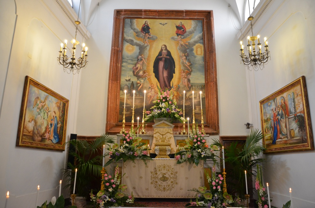 Visita ai Sepolcri ad Alcamo durante il Giovedì Santo (2012); sull'altare "L'immacolata Concezione" di Giuseppe Carrera